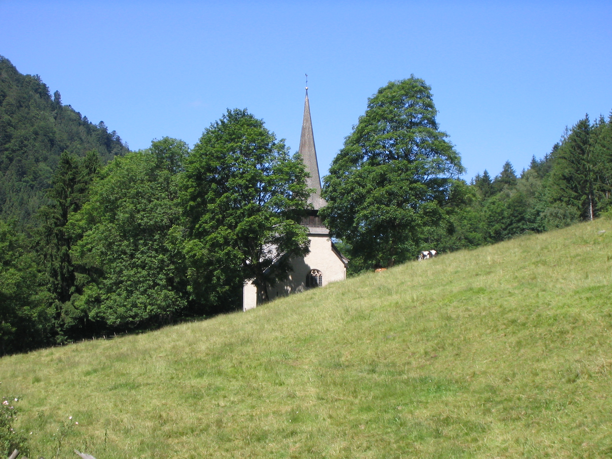 Die Kapelle Sankt Oswald im Höllental gehört politisch zu Breitnau, kirchlich aber zu HInterzarten